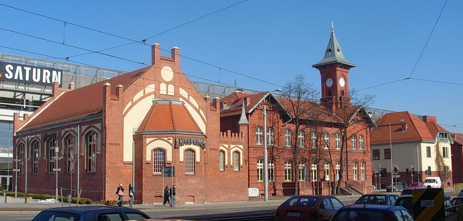 Budynki administracyjne dawnej Rzeźni Miejskiej w Bydgoszczy, Carl Meyer 1890-1910